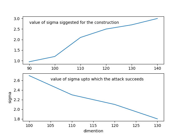 Оценка атаки внедрением на схему шифрования ggh